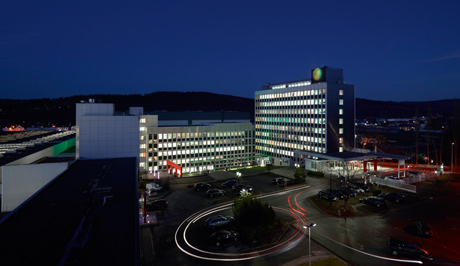 Das Hauptwerk in Arnsberg.